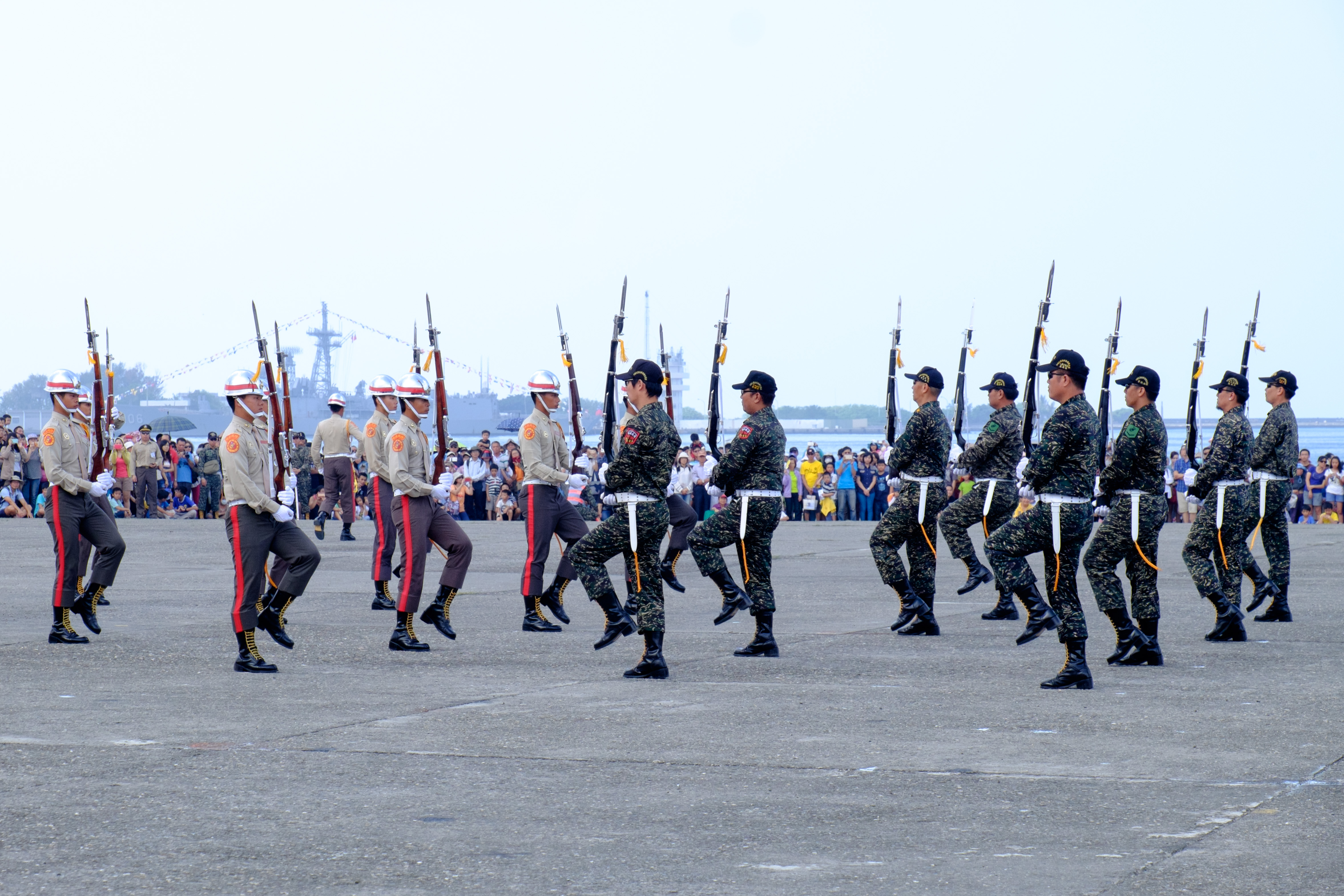 2015年左營軍港營區開放活動，操演中的海軍陸戰隊儀隊（左）與著用迷彩服的退伍儀隊隊員（右）。